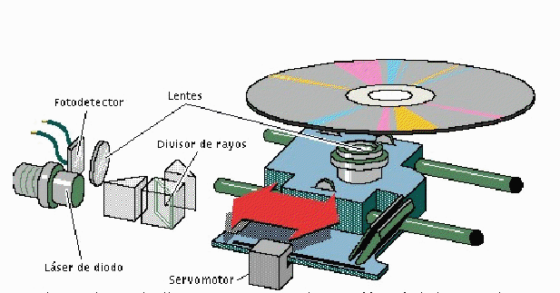 Lectora de CD